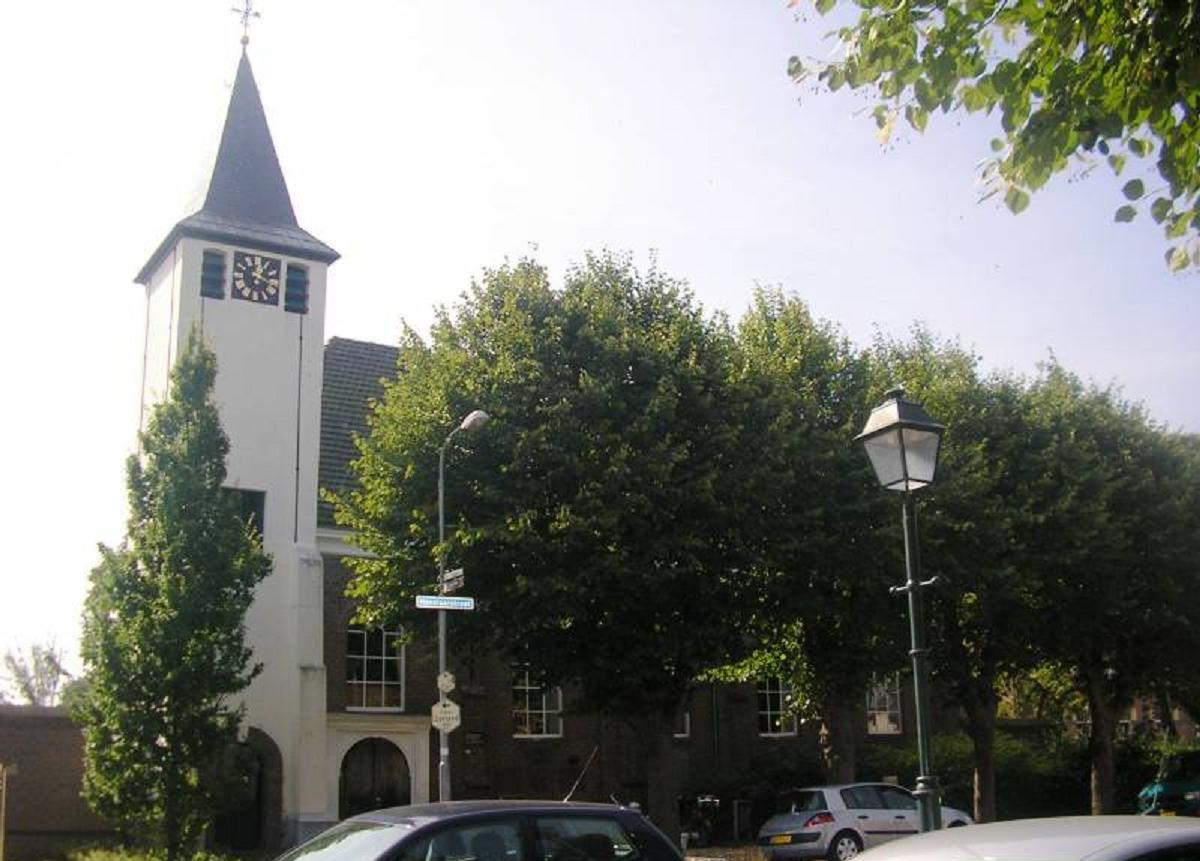 N.H.Kerk zomer 2008